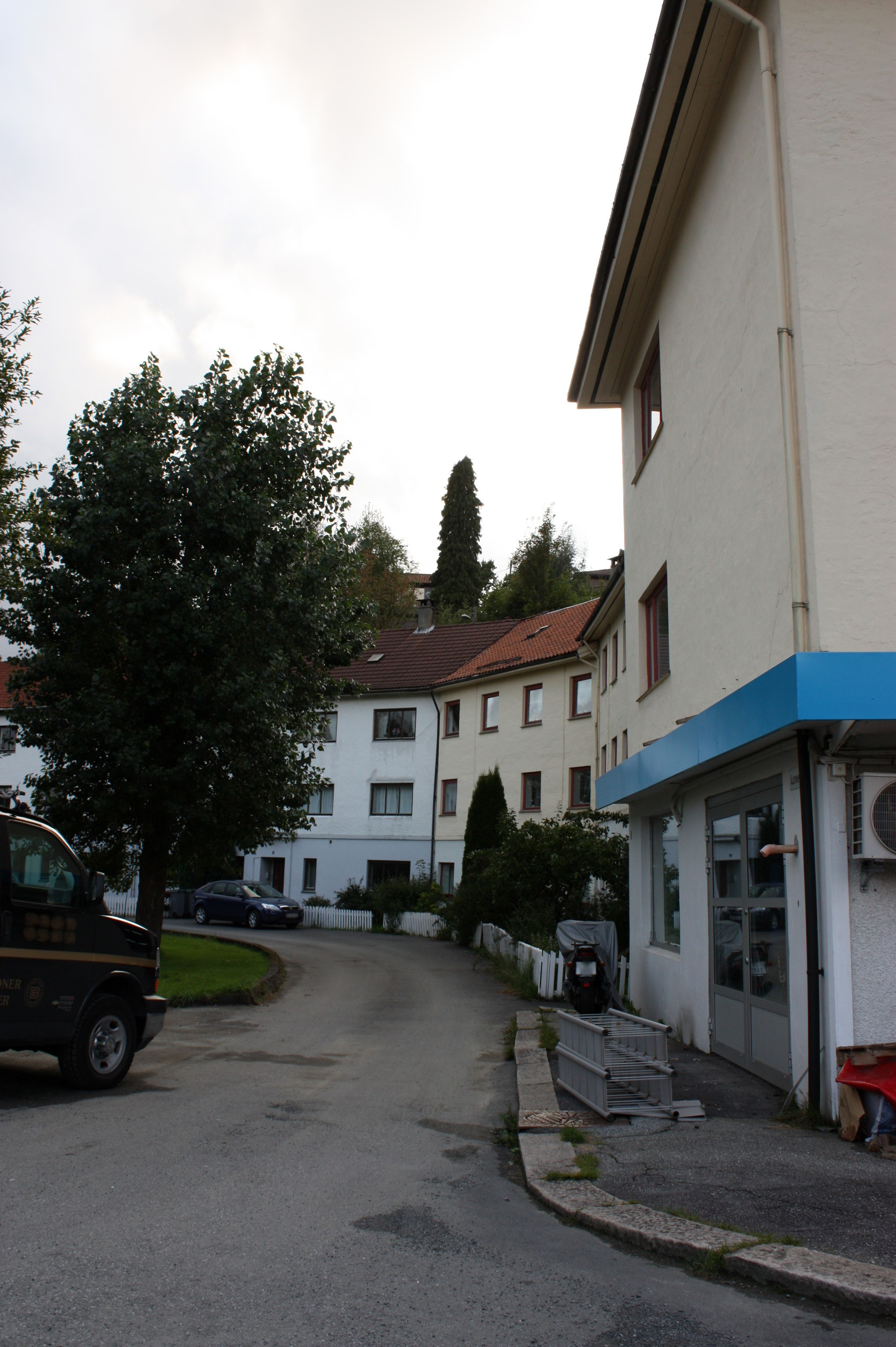 Lonevegen, Fana, Bergen.